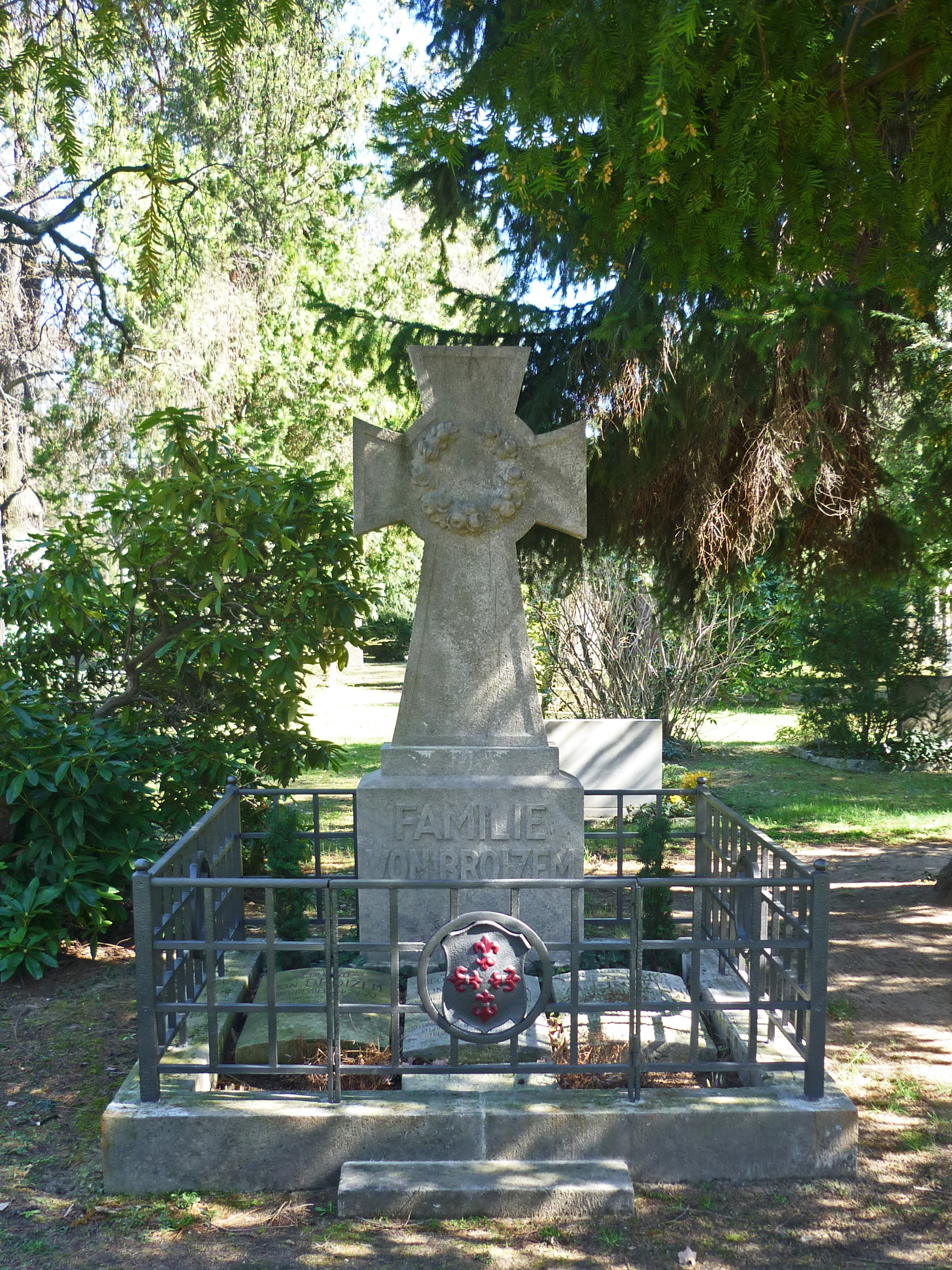 Grabstätte von Georg Hermann von Broizem (1850–1918), General der Kavallerie des königl.-sächs. Gardereiter-Regiments, auf dem Trinitatisfriedhof in Dresden